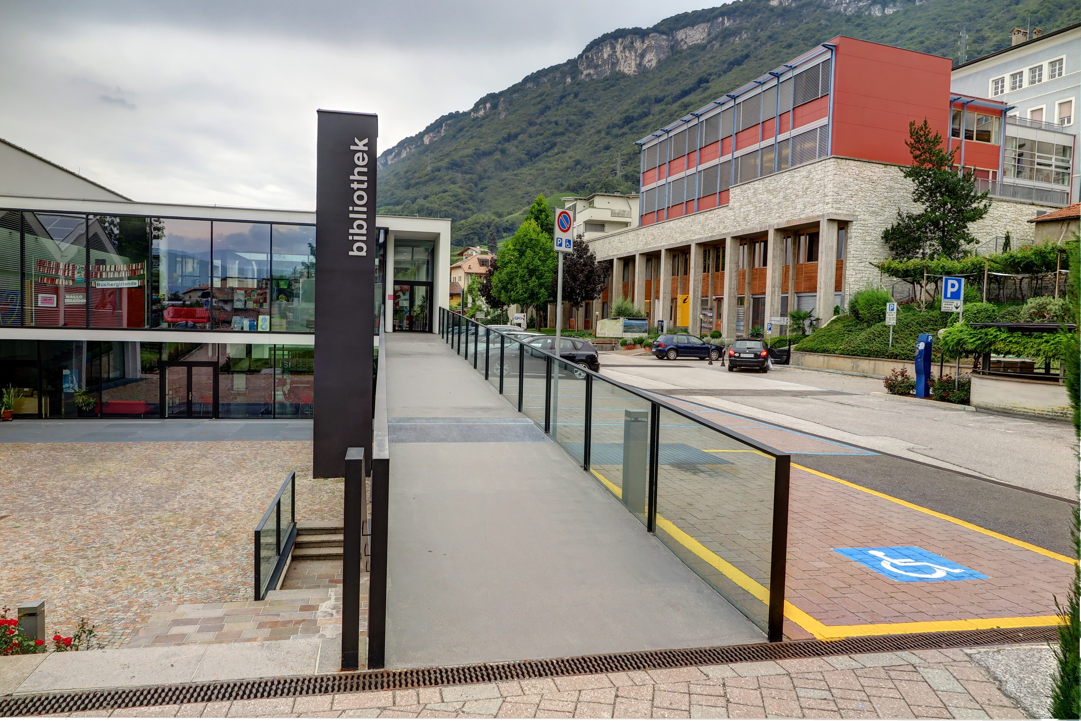 Bibliothek (links) und Tourist-Info (hinten rechts) in Tramin (Südtirol, Italien)